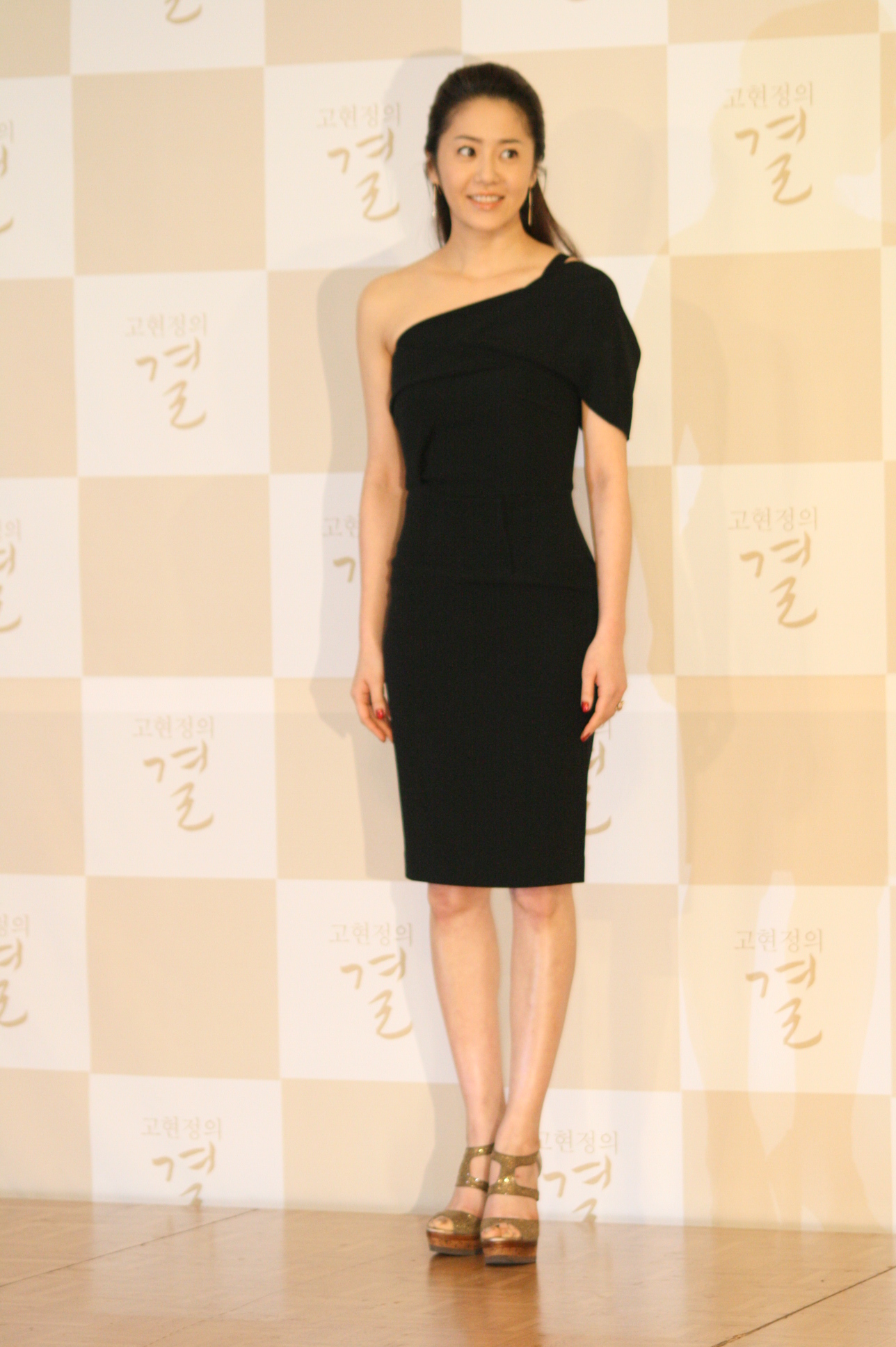 고현정의 결 출간발표회